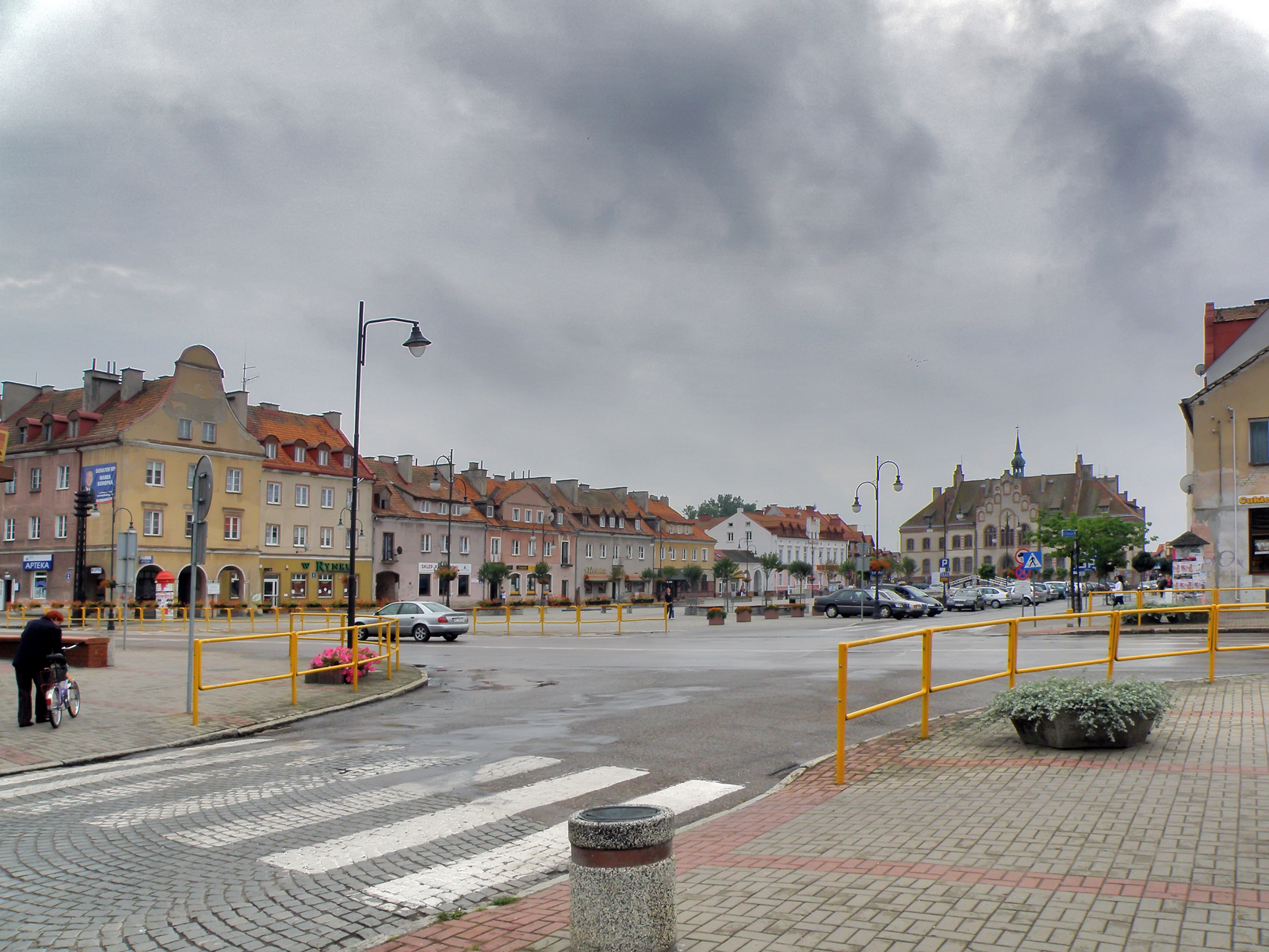 Polska, Pisz - Plac Daszyńskiego (Rynek) - Ratusz This photo of Warmian-Masurian Voivodeship was taken during Wikiexpedition 2012 set up by Wikimedia Polska Association.You can see all photographs in category Wikiekspedycja 2012. The making of this document was supported by Wikimedia Polska.